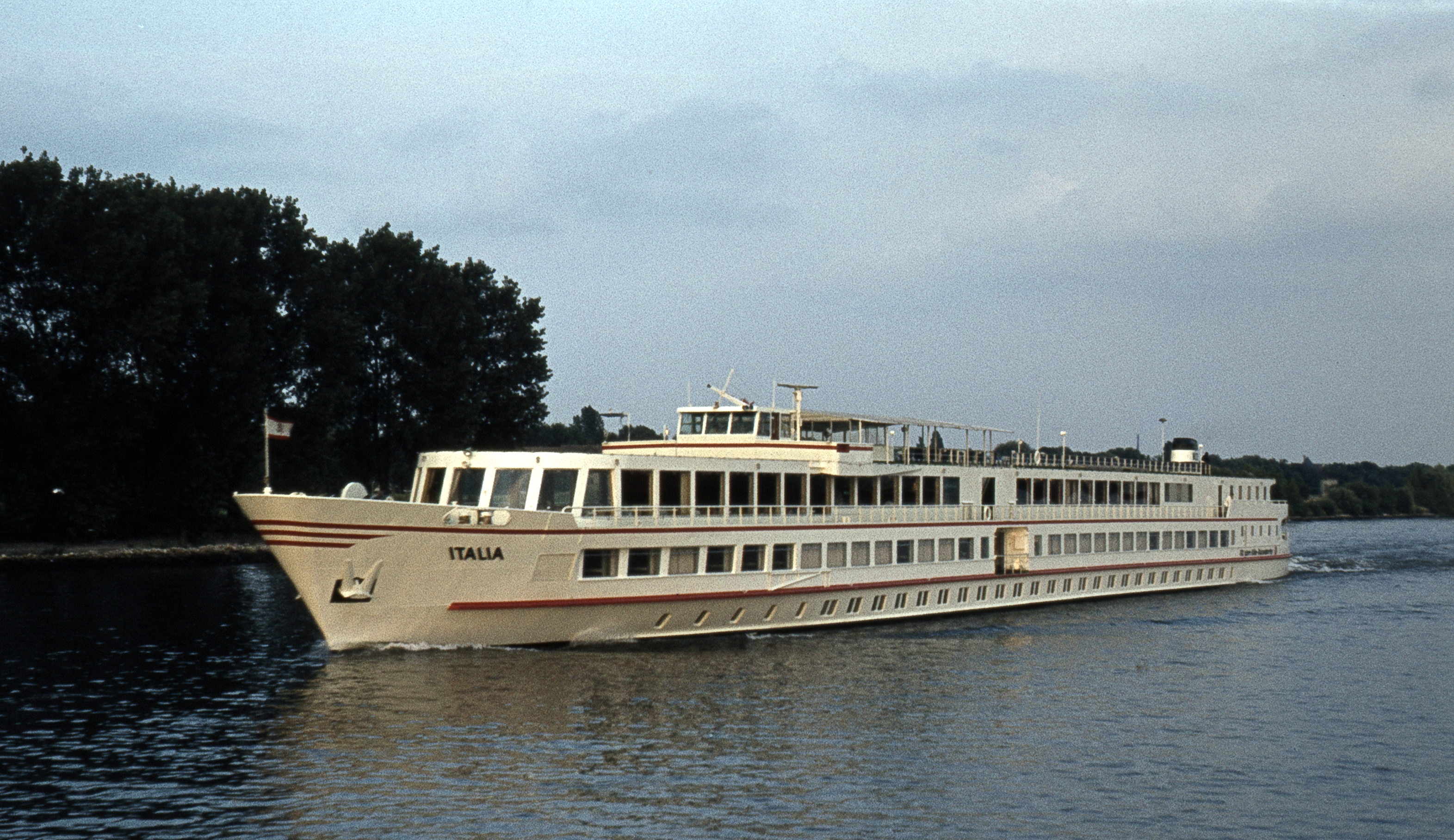 Das Kabinenfahrgastschiff Italia auf Fahrt auf dem Rhein.